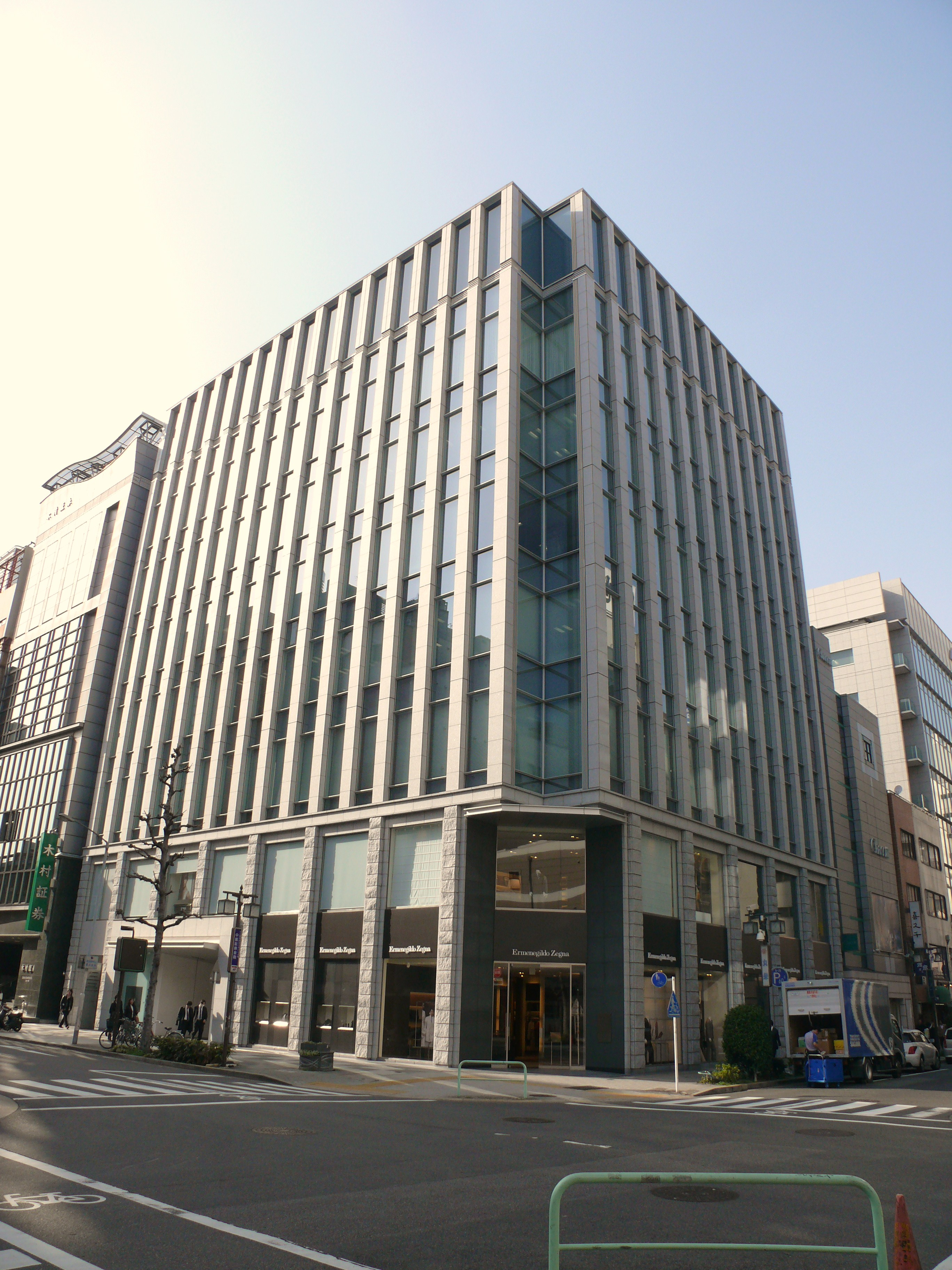 名古屋証券取引所（名古屋証券取引所ビル）